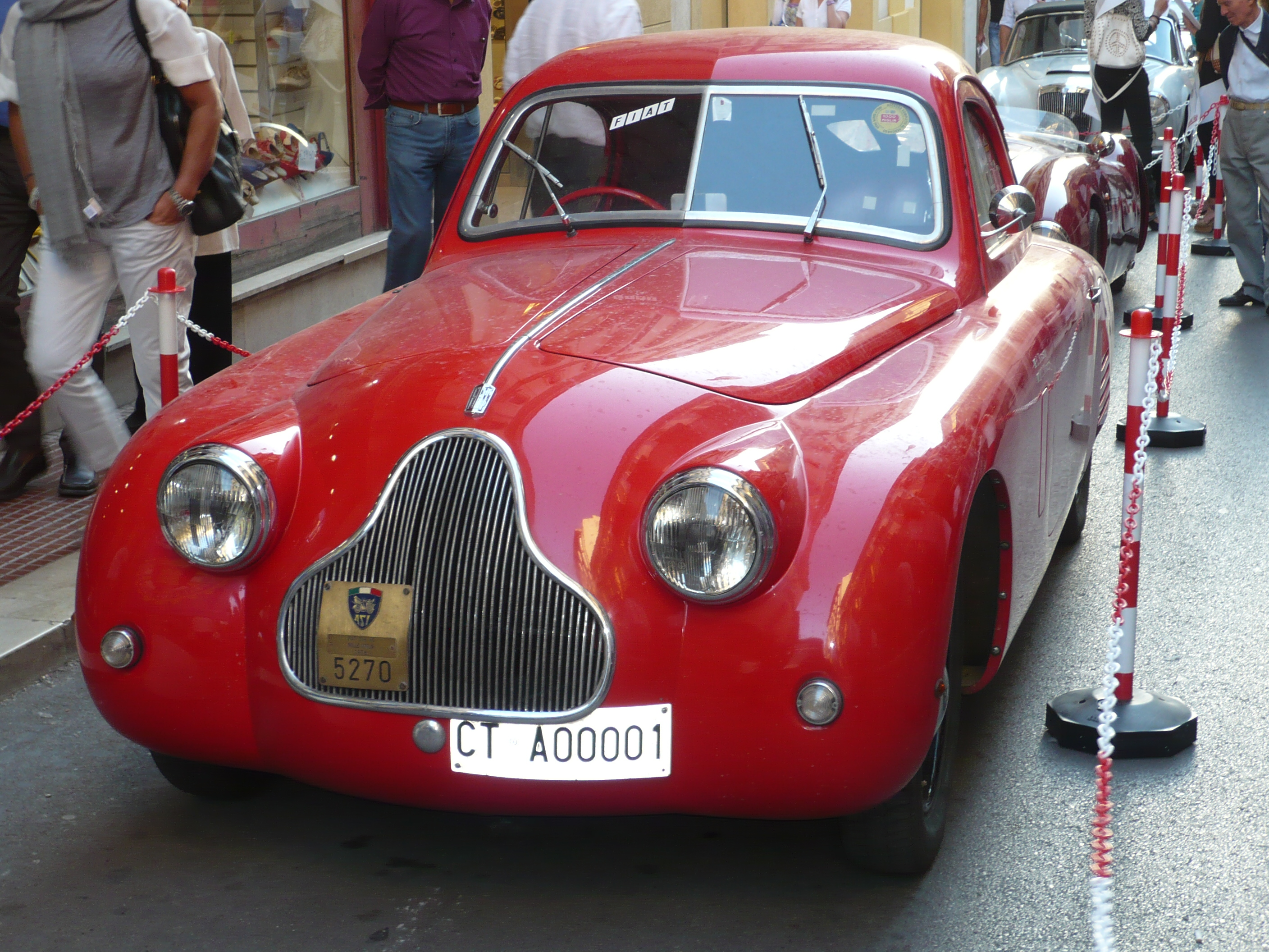 Anteriore della Fiat 508 CS MM o berlinetta Mille Miglia prodotta nel 1938 su meccanica della Spider Sport del 1934, mentre la carrozzeria è quella di una berlinetta biposto aerodinamica, pensata per le corse in climi rigidi come appunto la Mille Miglia. Motore Fiat 108C da 4 cilindri in linea di 995 cm³ a valvole laterali, con carburatore Solex mono corpo. Sospensioni: ant. e post. ad assale rigido, con balestre semiellittiche.